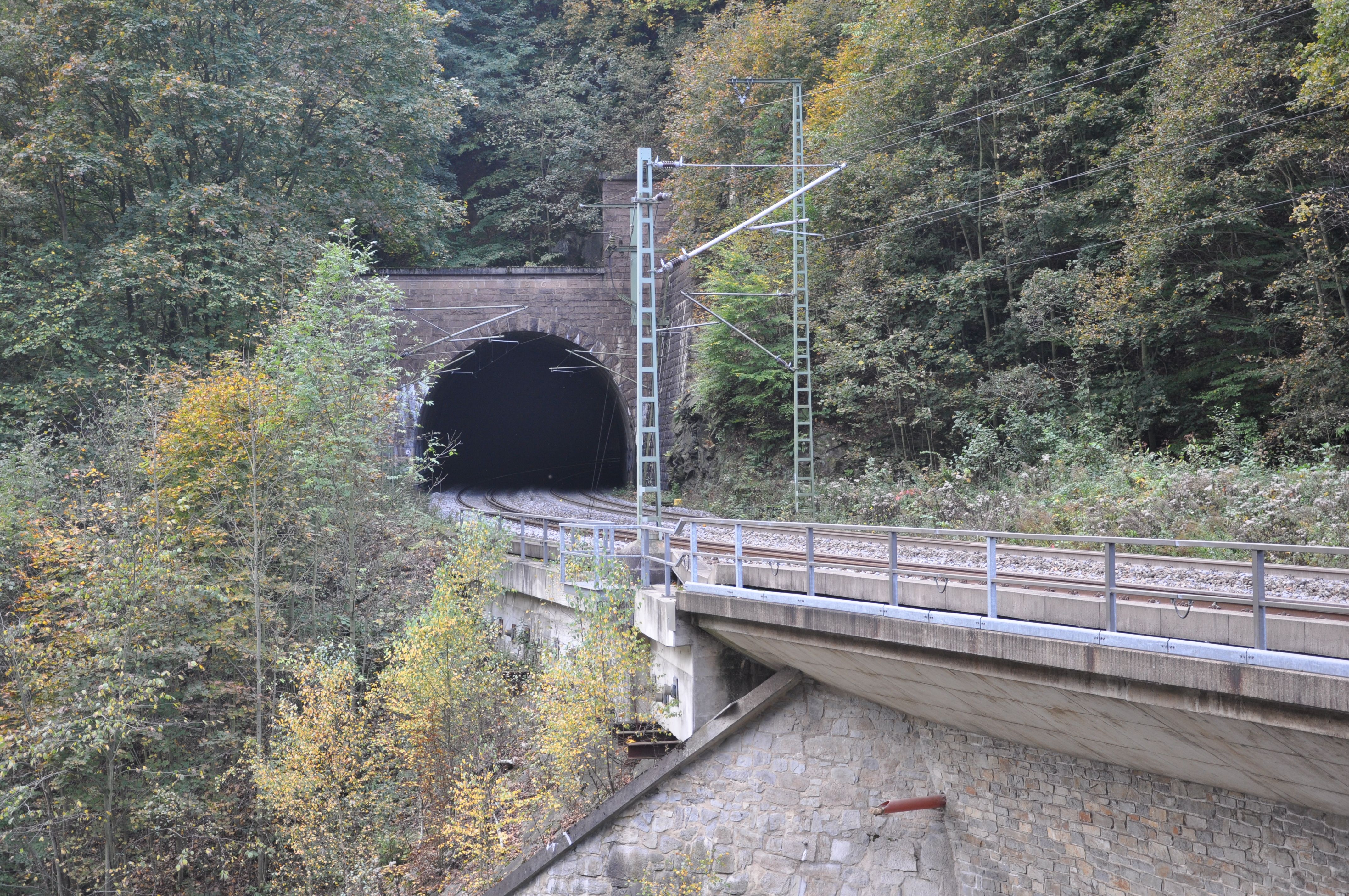 Bahnstrecke Dresden–Werdau, Tunnel Edle Krone